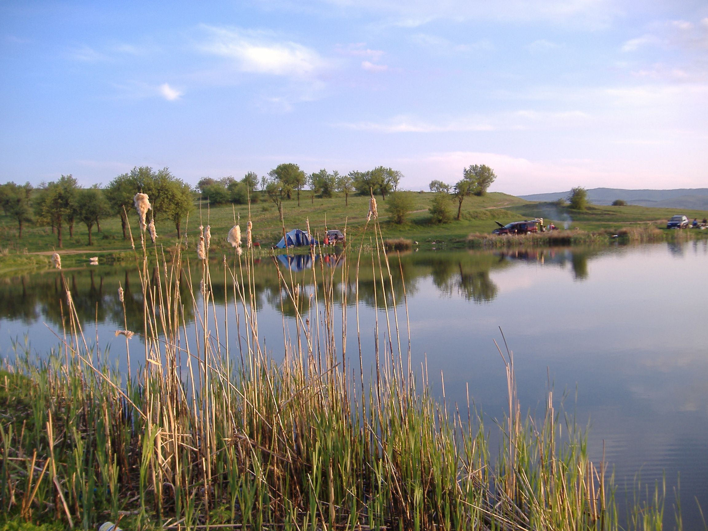 Язовирът край село Слаковци, България